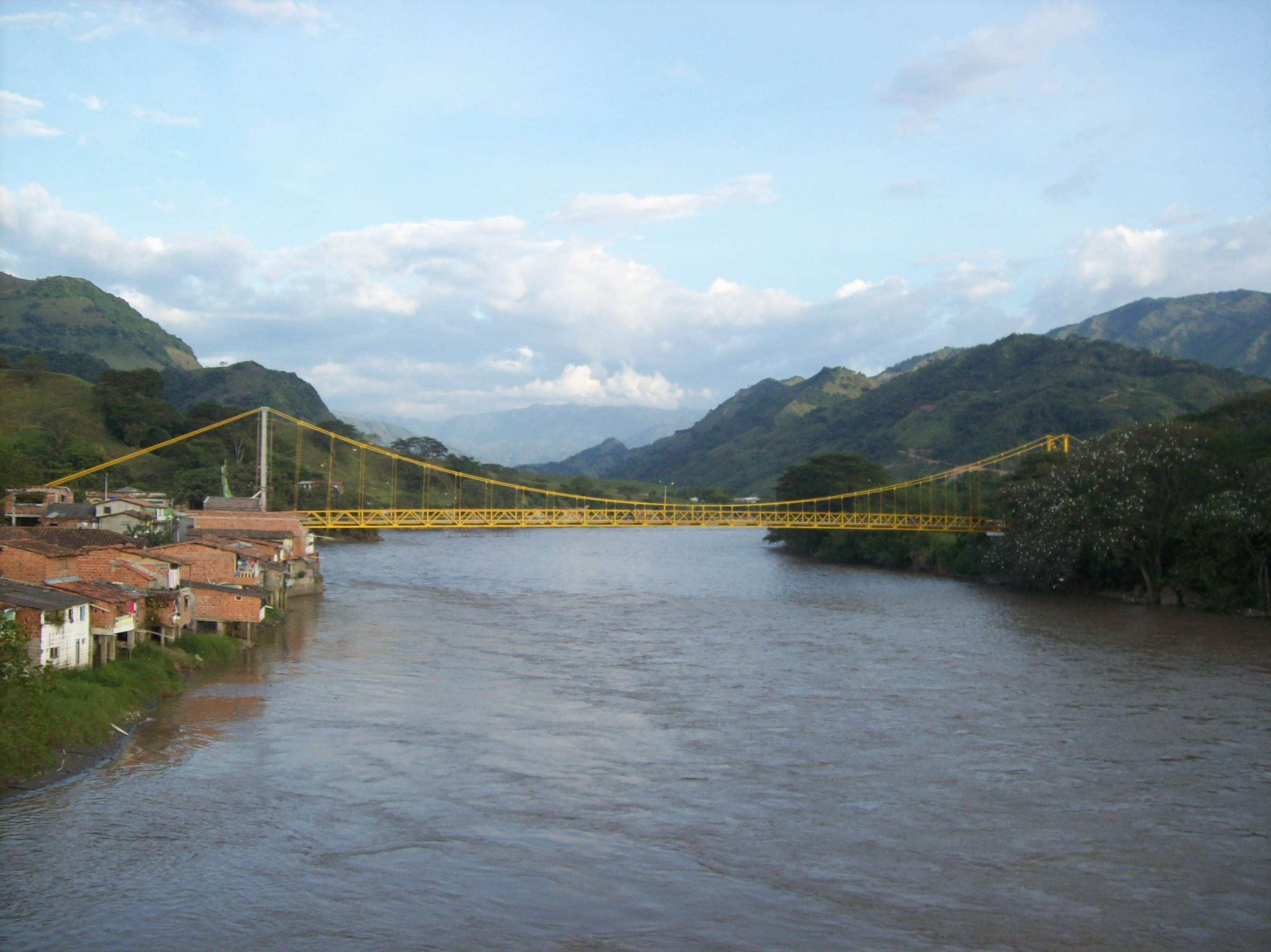 Puente sobre el Río Cauca en La Pintada, Antioquia.